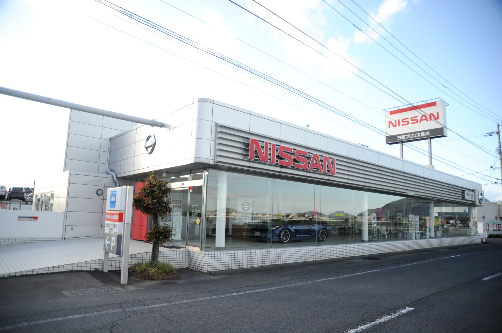 本社 善通寺店